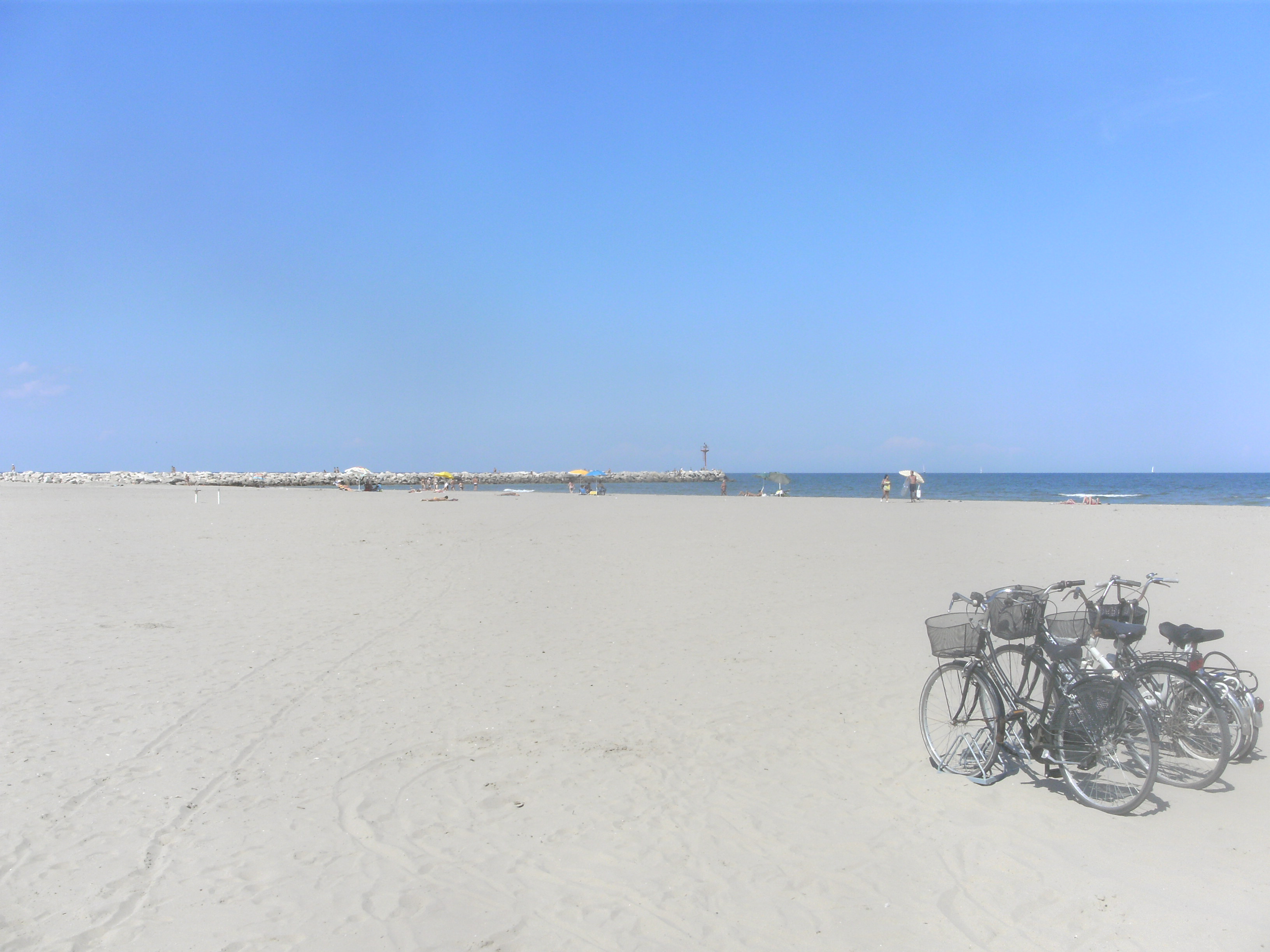 Öffentliche (nicht privat bewirtschafteter) Strandpartie im Norden von Lido degli Estensi